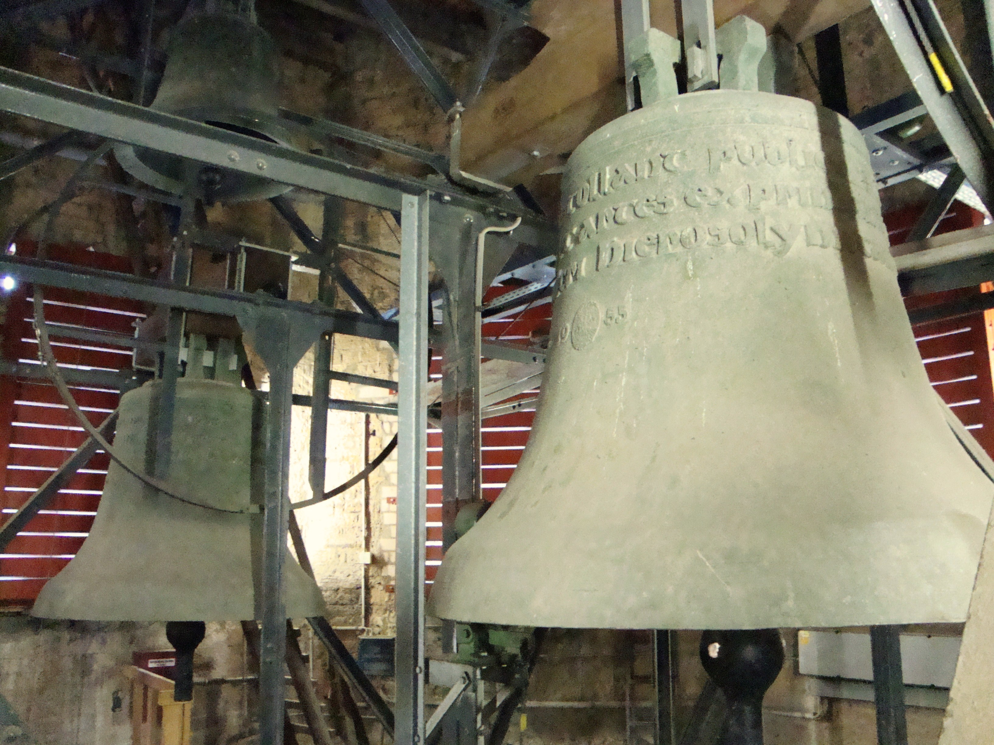 Glockenstube von St. Andreas in Köln. Rechts: Glocke 2, links: Glocke 1, darüber: Glocke 4. Glocke 3 (nicht im Bild) hängt über Glocke 2.